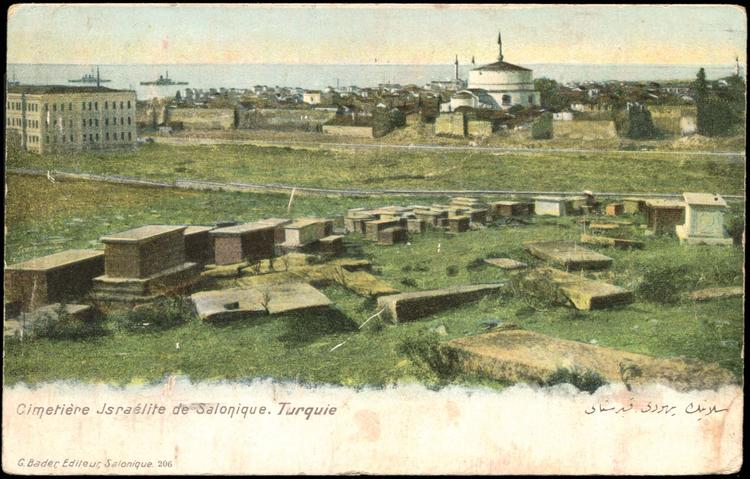 Солун. Еврейските гробища. Османска пощенска картичка.